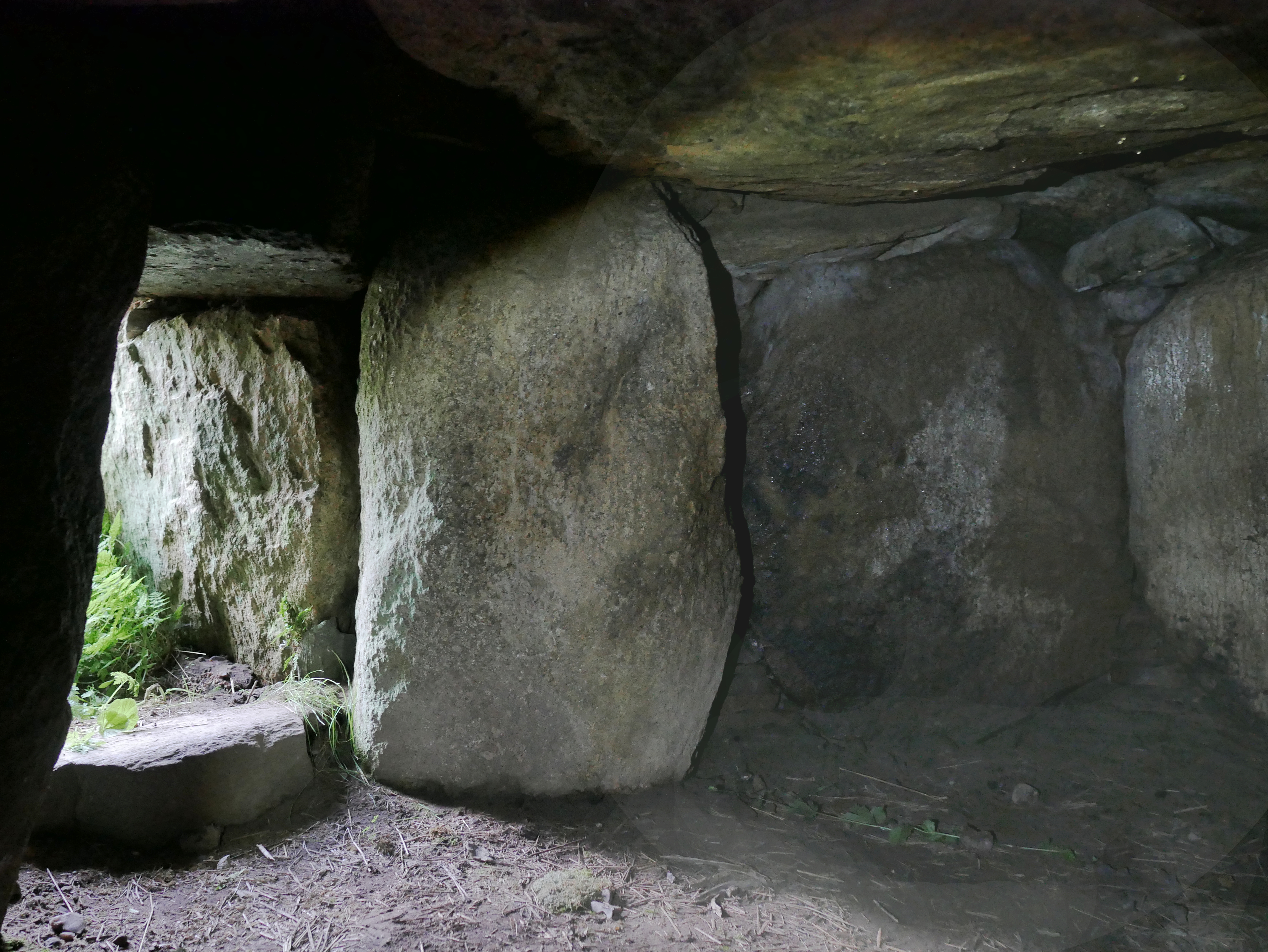 Thostrup Dolmen Nord Grabkammer - Eingang von Innen